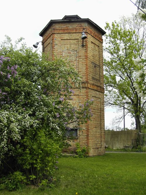 Wieża ciśnień przy Zajeździe Dworek w Choroszczy k. Białegostoku